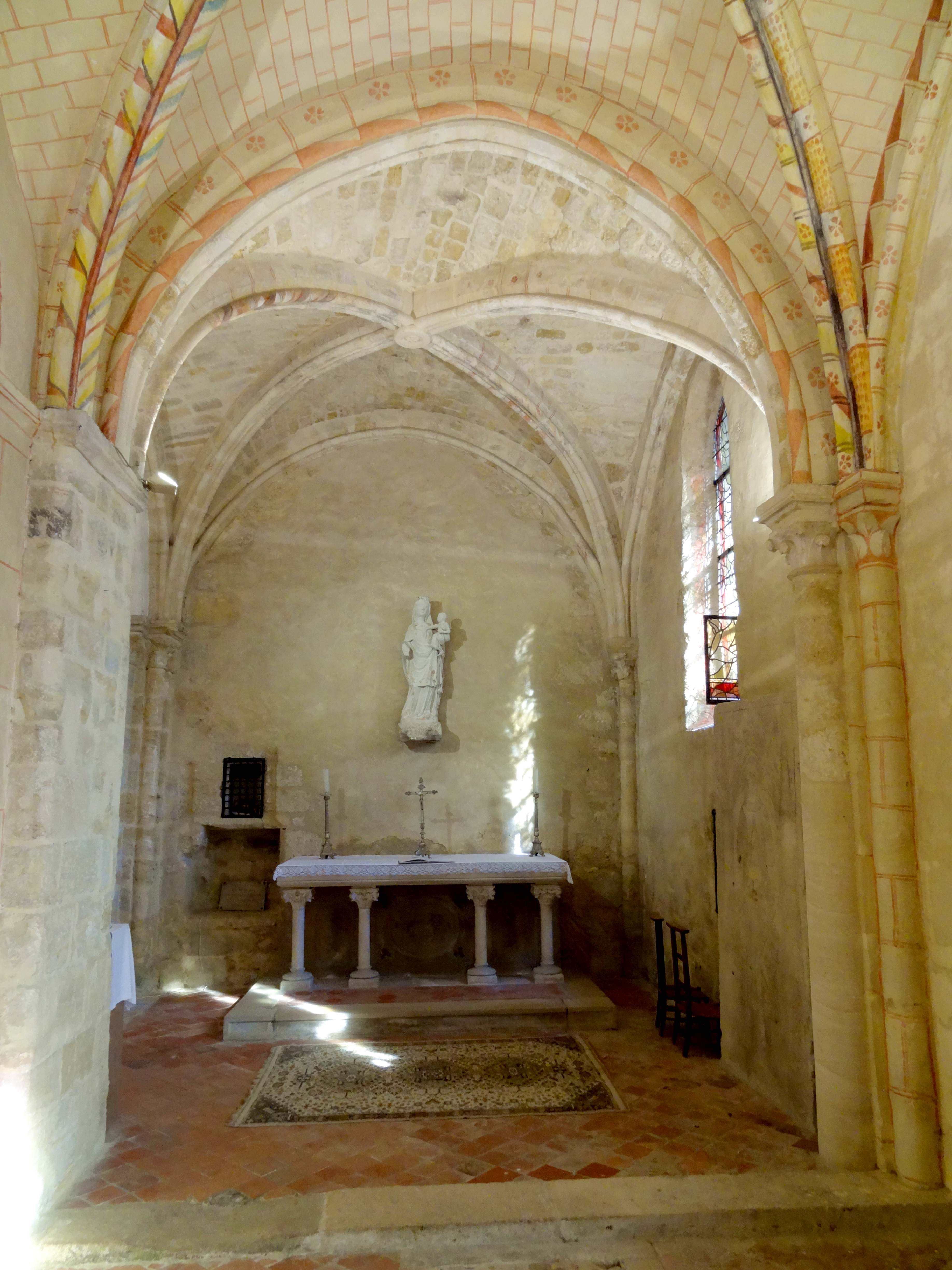 Intérieur de l'église - voir titre.